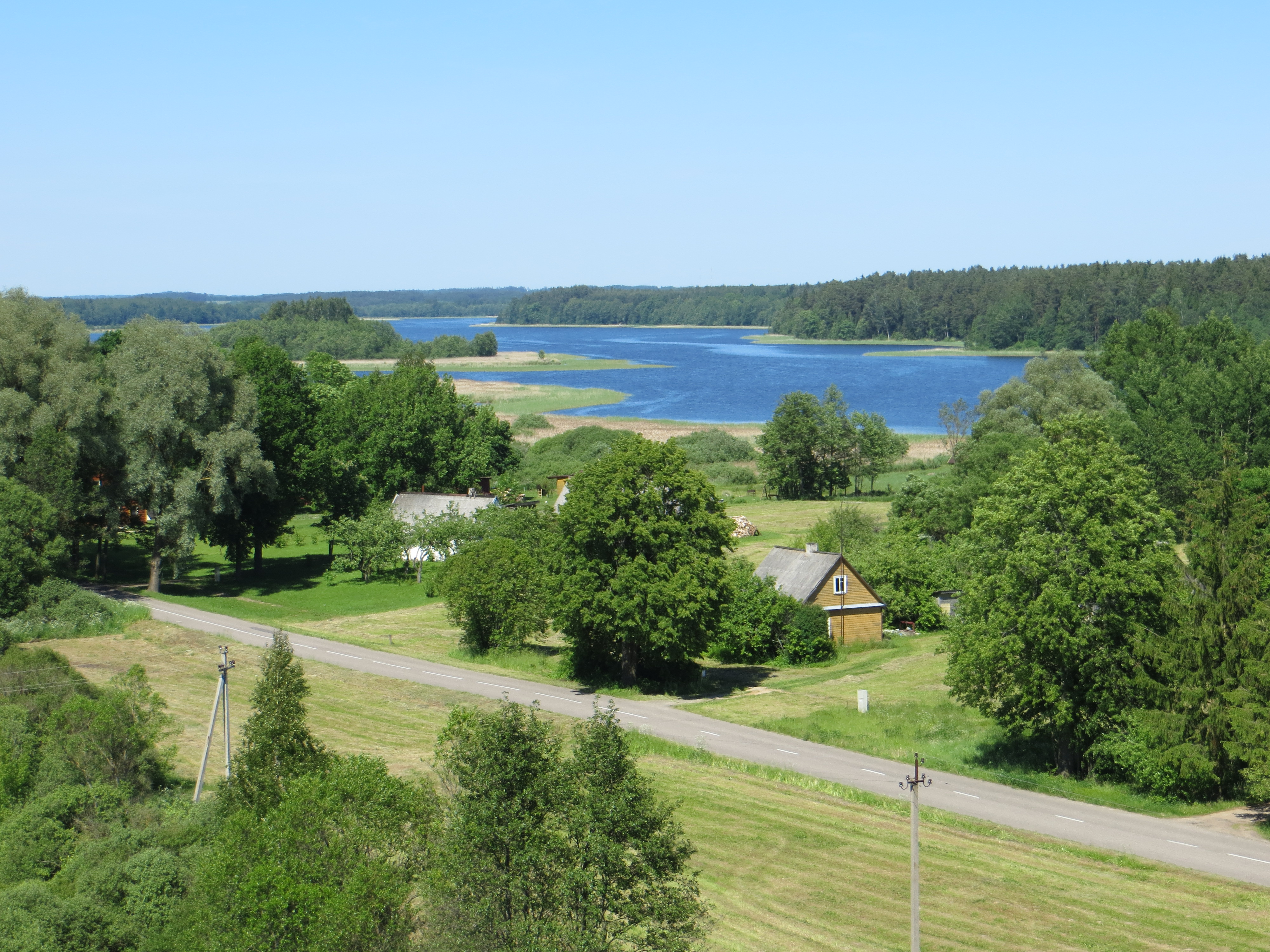 Kavoliai 32300, Lithuania